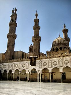 الأزهر